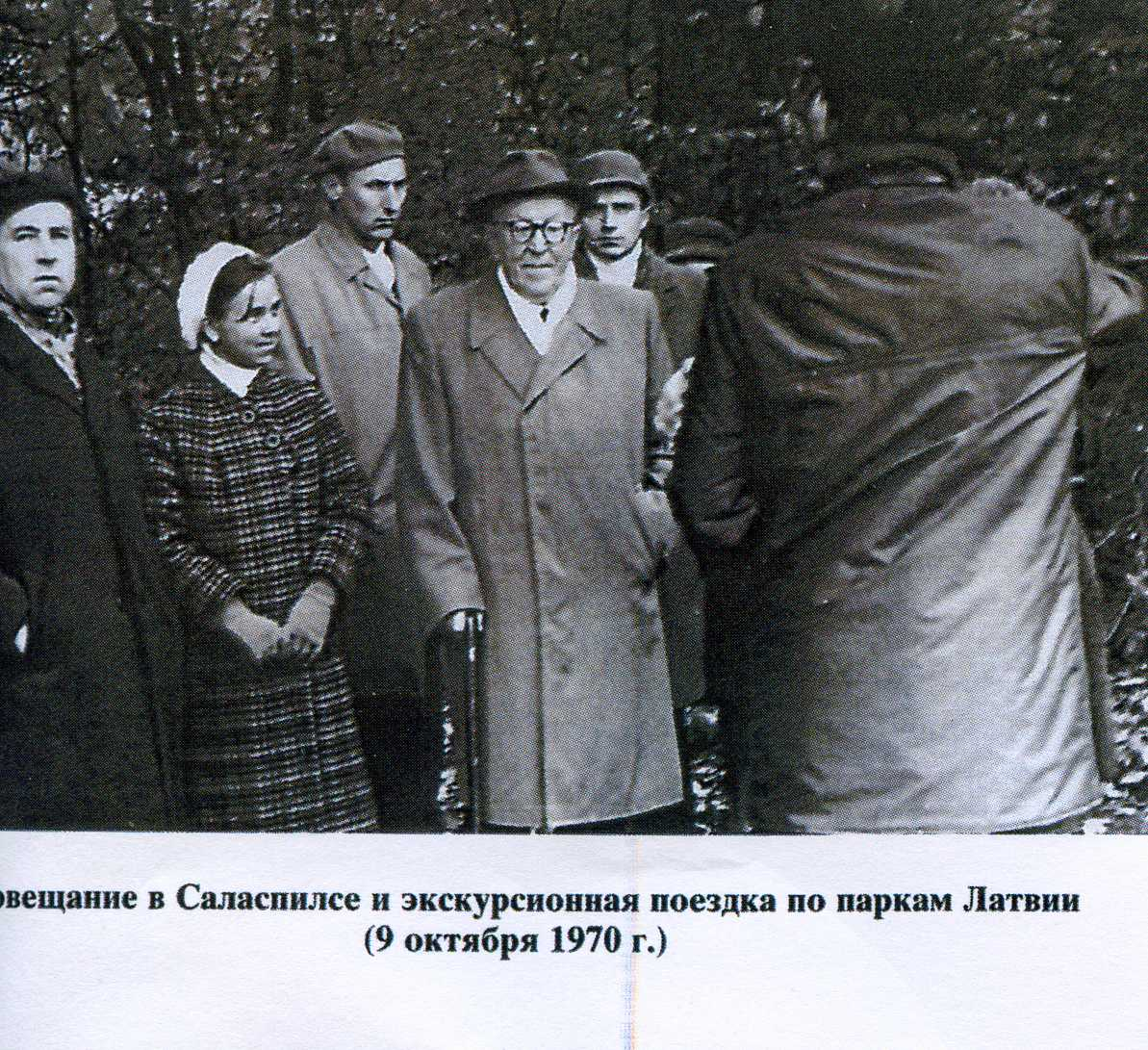 Совещание в Саласпилсе в экскурсионной поездке по паркам Латвии ( 9 октября 1970г.)